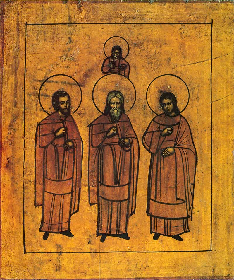 Святые Гурий, Самон и Авив